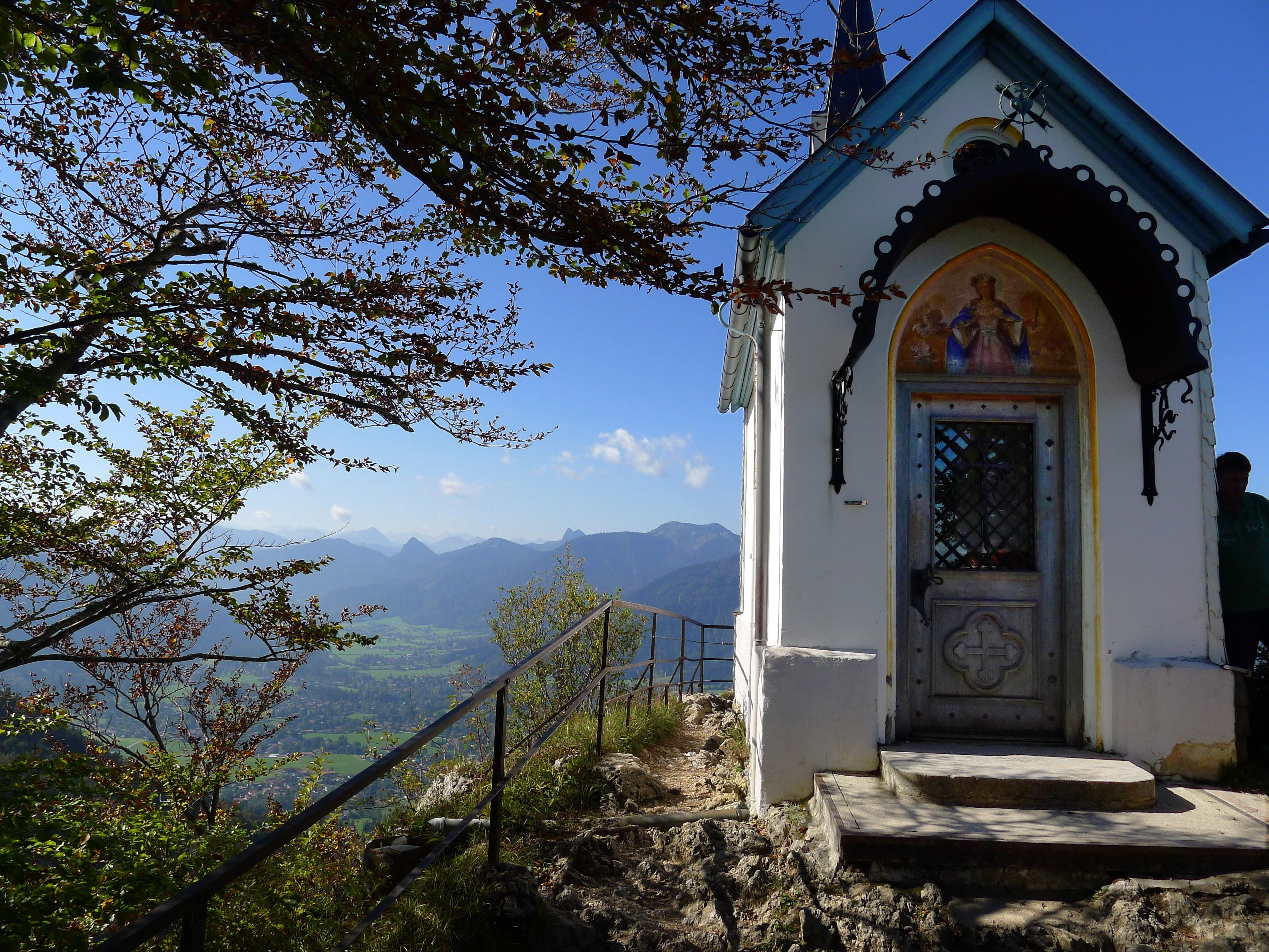 Aussicht von der Riedersteinkapelle, Nähe Tegernsee, Bayern in das Tal der Weißach